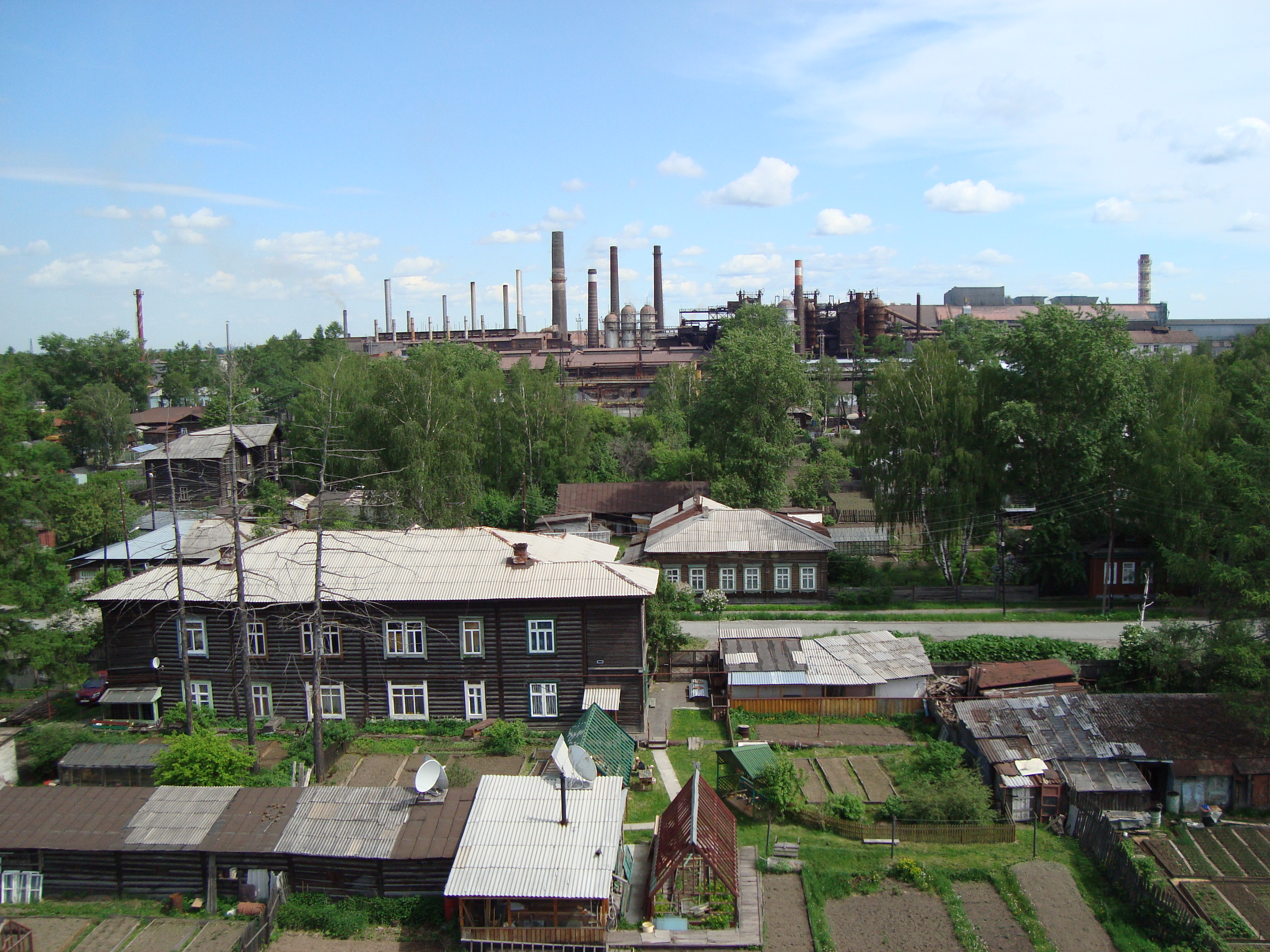 Вид на Металлургический завод им. А. К. Серова с вышки стадиона «Металлург»